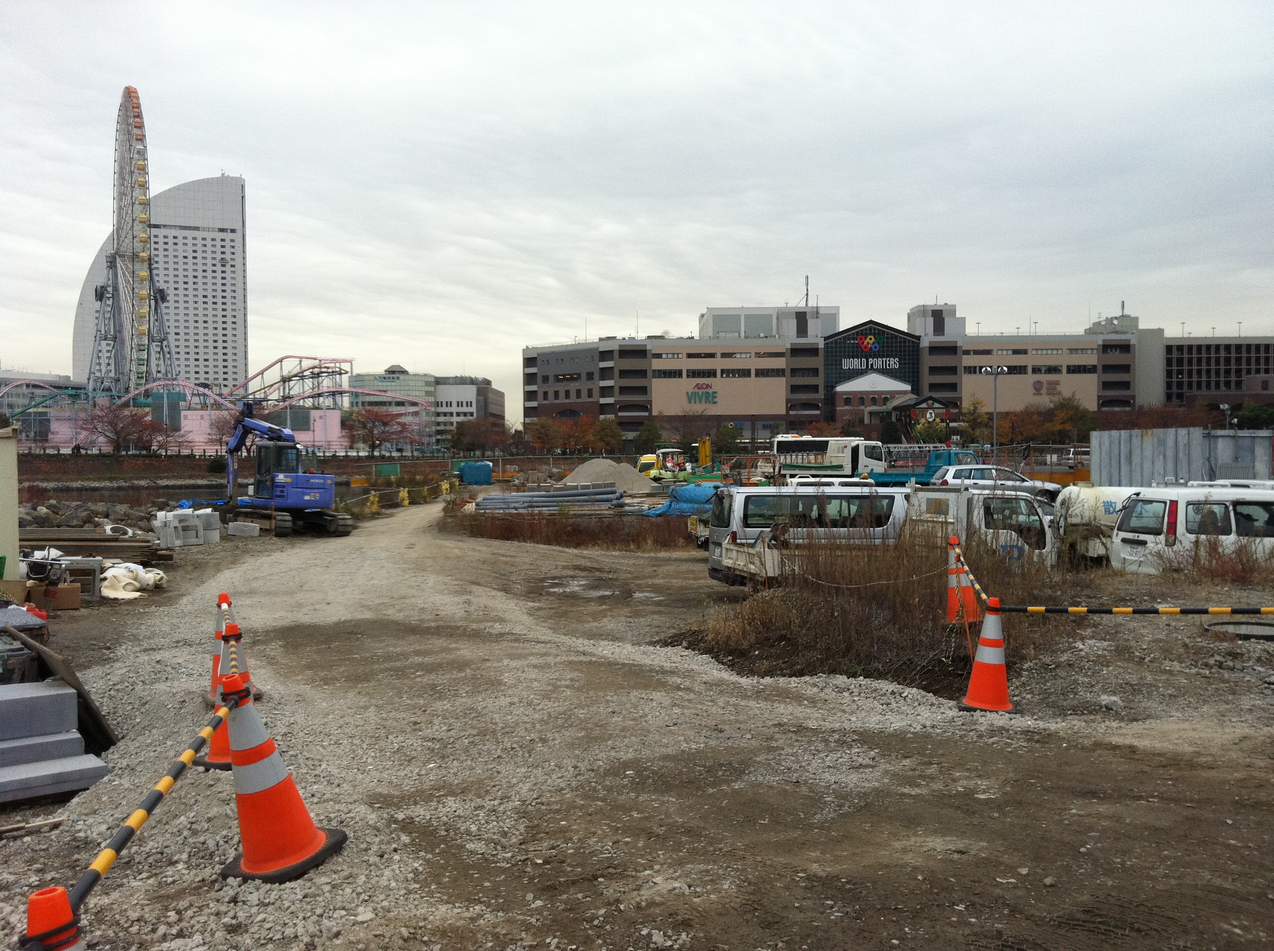 北仲通北地区の開発は休止中だが、解体が進んでいる場所もある（2011年12月）。